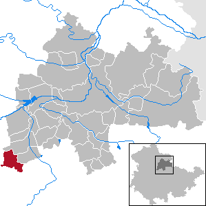 Witterda in Thuringia - District Sömmerda